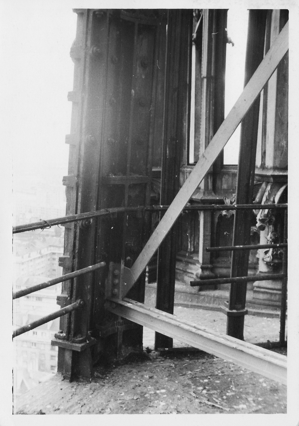 renforcement avant solution définitive